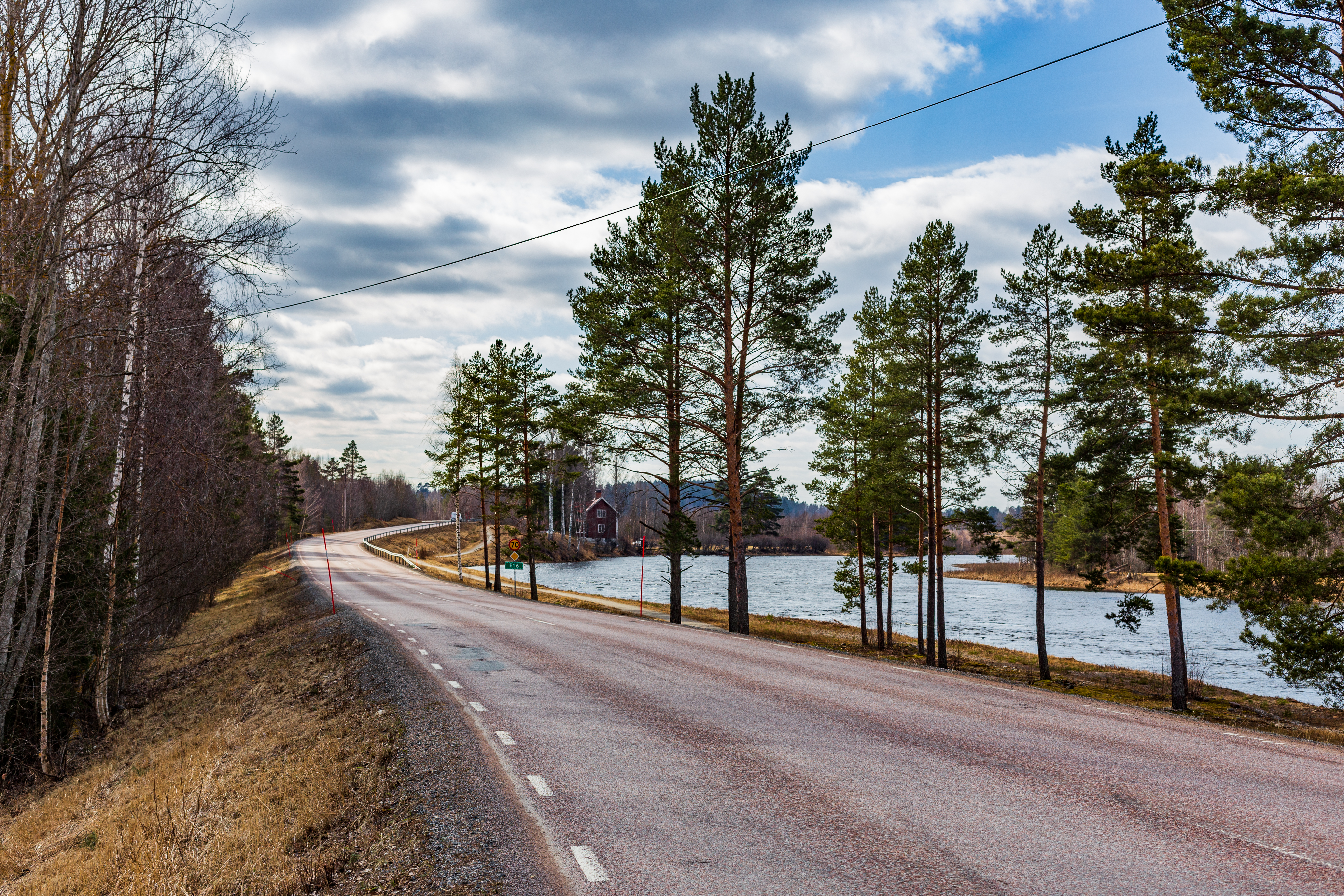 Länsväg W 854, mellan Stämshöjens naturreservat (t.v.) och Sundbornsån (t.h.). Falu kommun, Dalarnas län, Sverige.